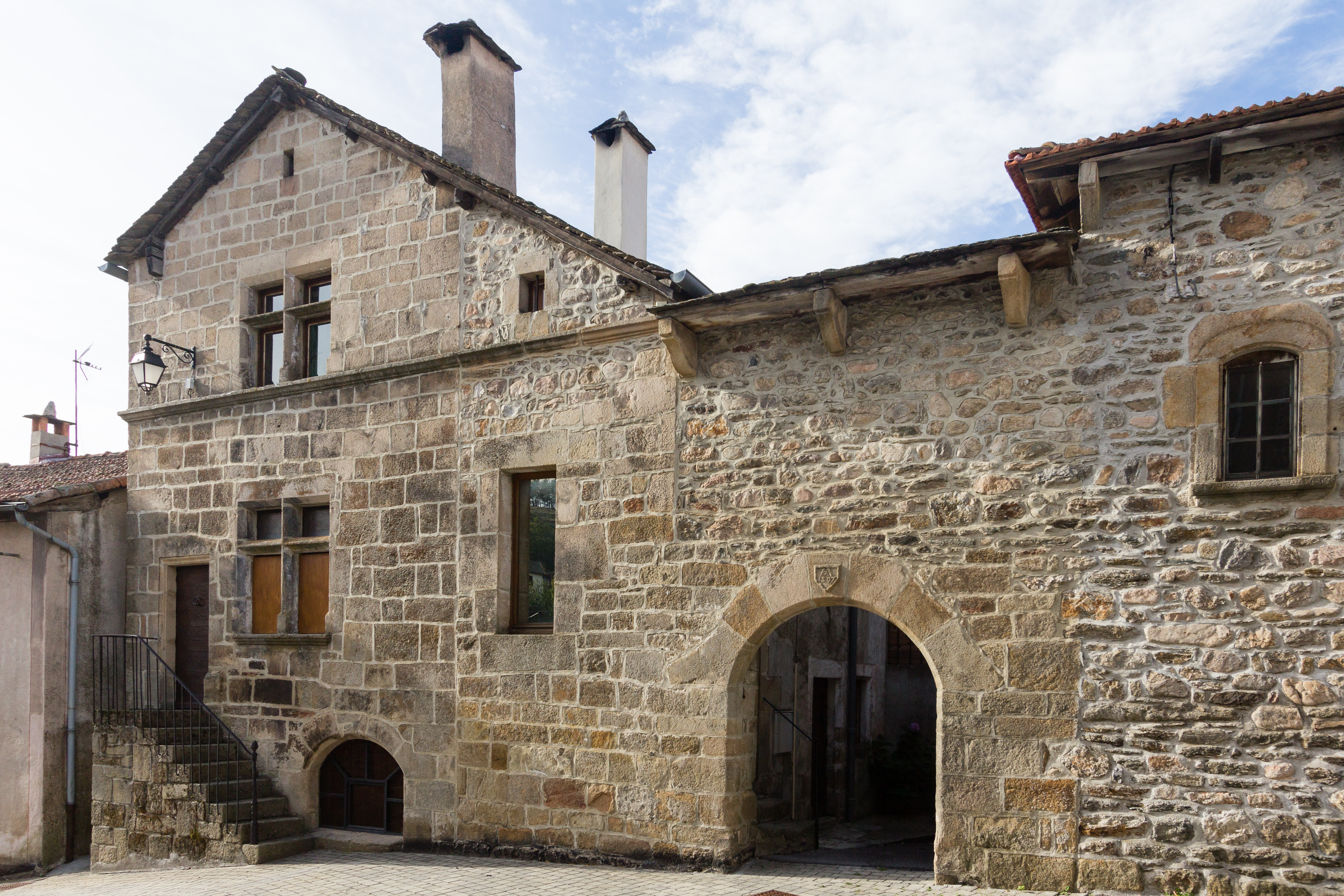 Maison du XVie siècle à Prévenchères (France).